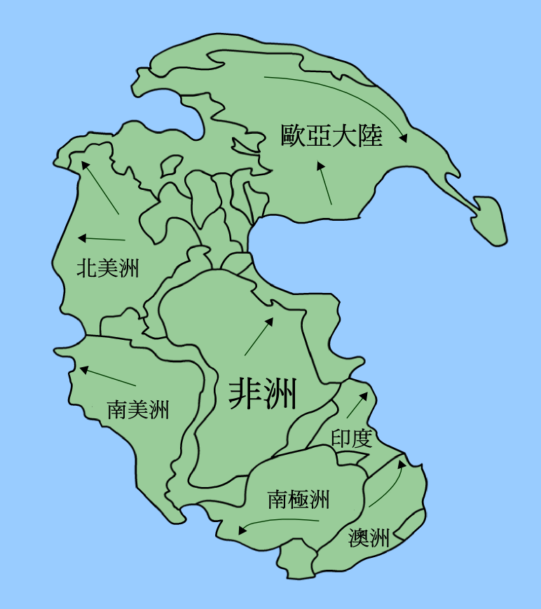 盤古大陸，依File:Pangaea continents.png修改。